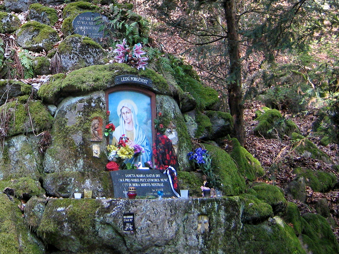 Oltář v Lesní pobožnosti v lázeňských lesích v Karlových Varech